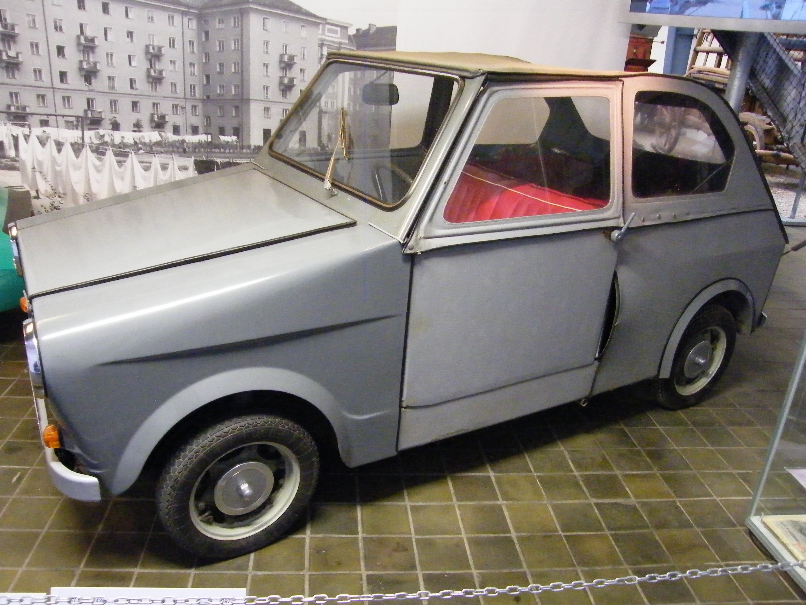 Velorex 435-O 350 ccm (1972) in NTM Prague